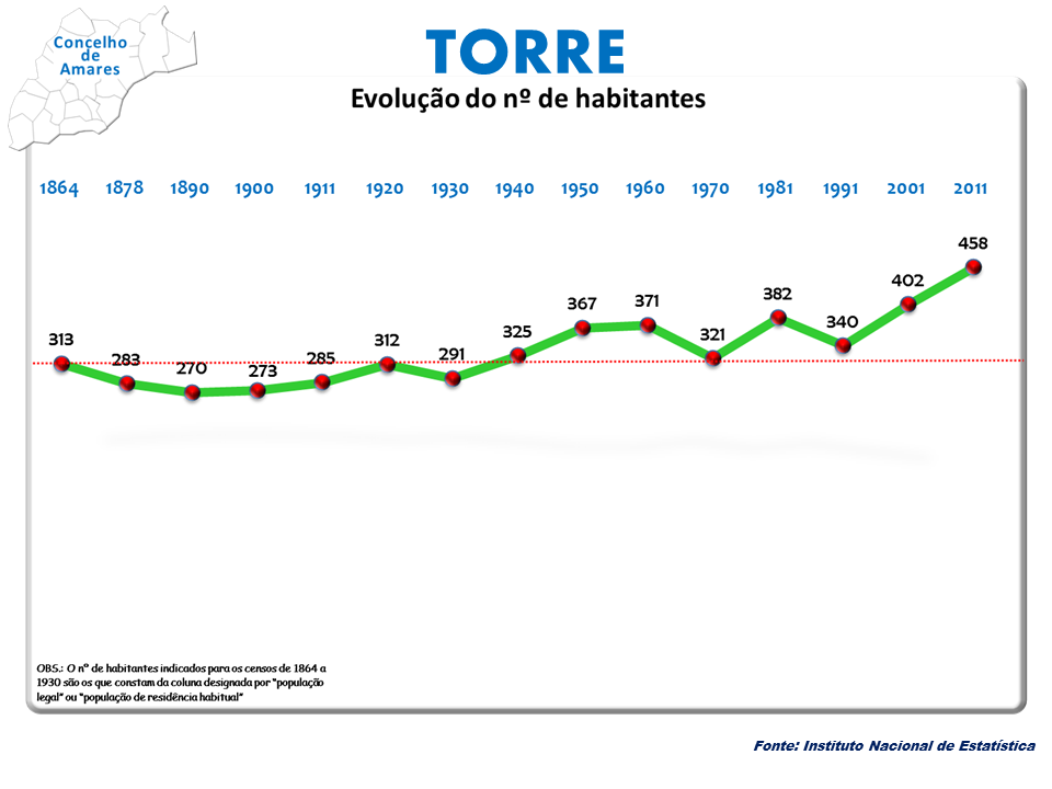 Censo 2011